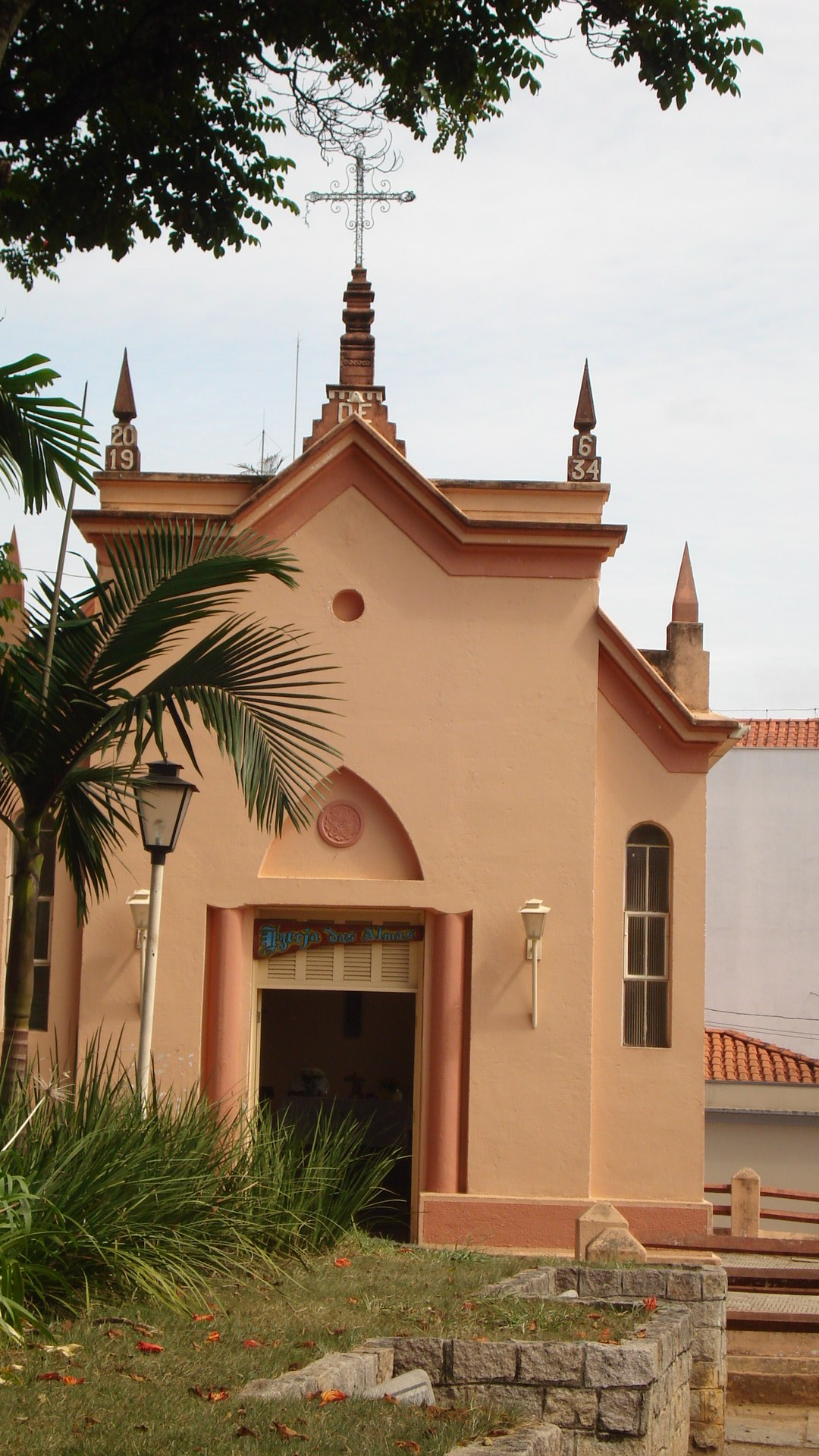 Igreja das Almas , cidade de Piracaia-SP.